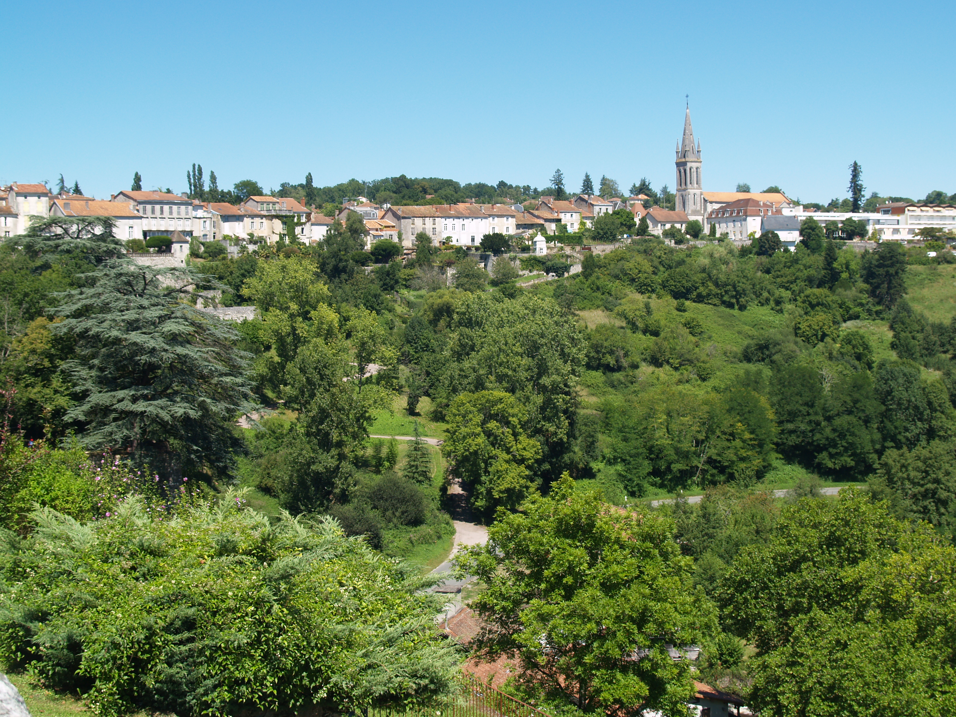 Panorama de la ville dominant la vallée du Bandiat